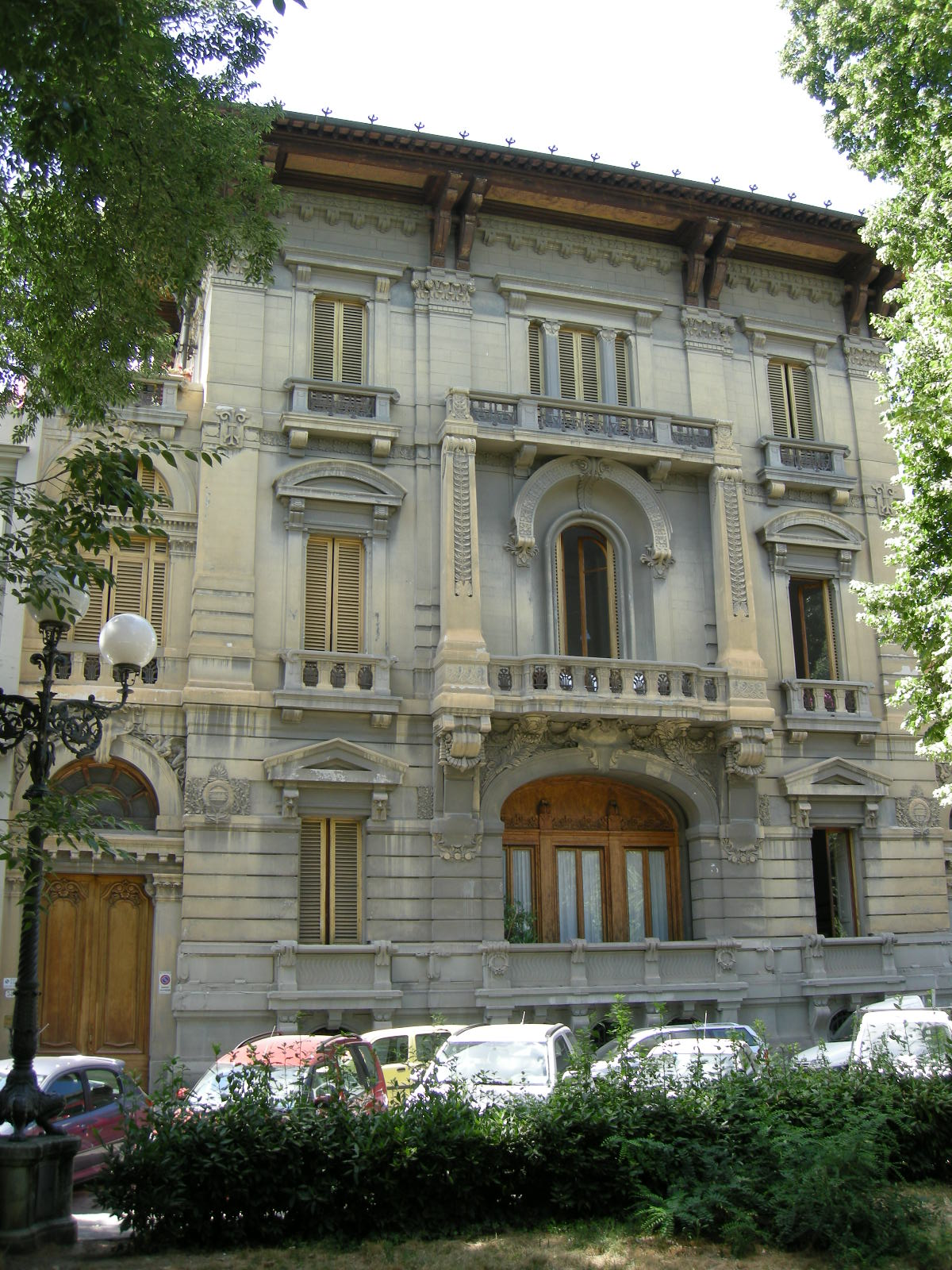 Villa uzielli